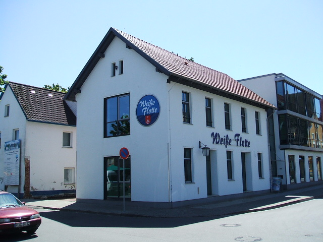 Stralsund, Hauptgebäude der Weißen Flotte